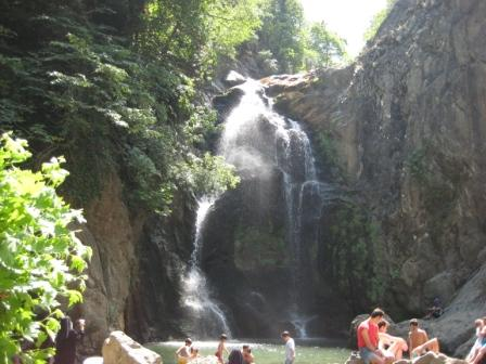 Su Düşen Waterfall,Yalova,Turkey